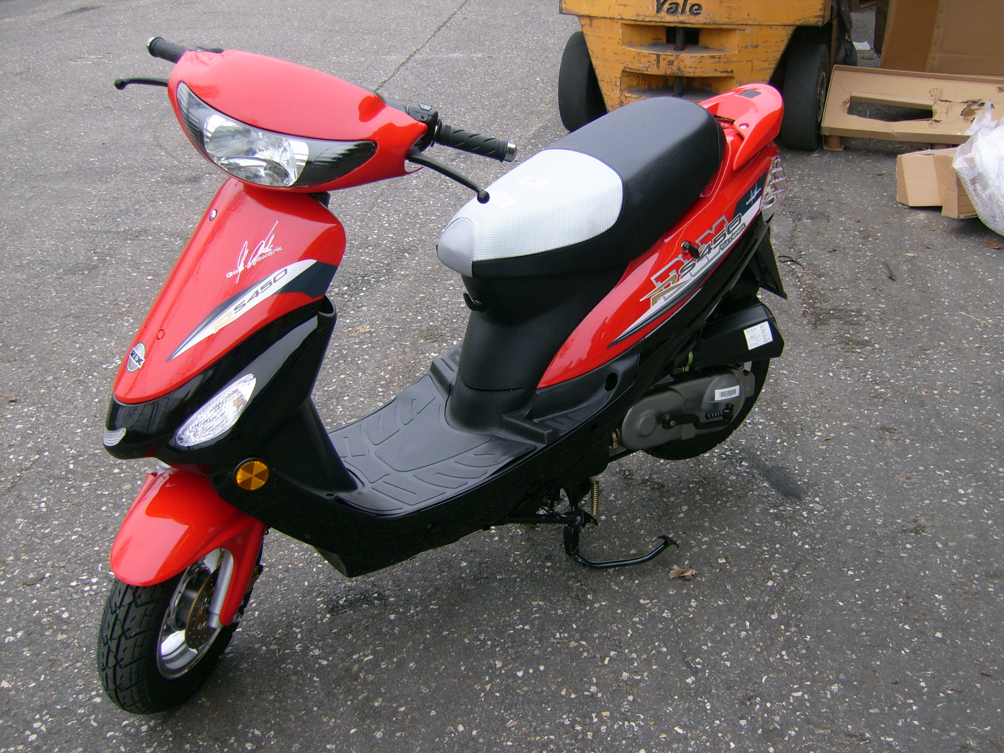 Rex RS 450 Mokickroller, hergestellt von Jinan Qingqi